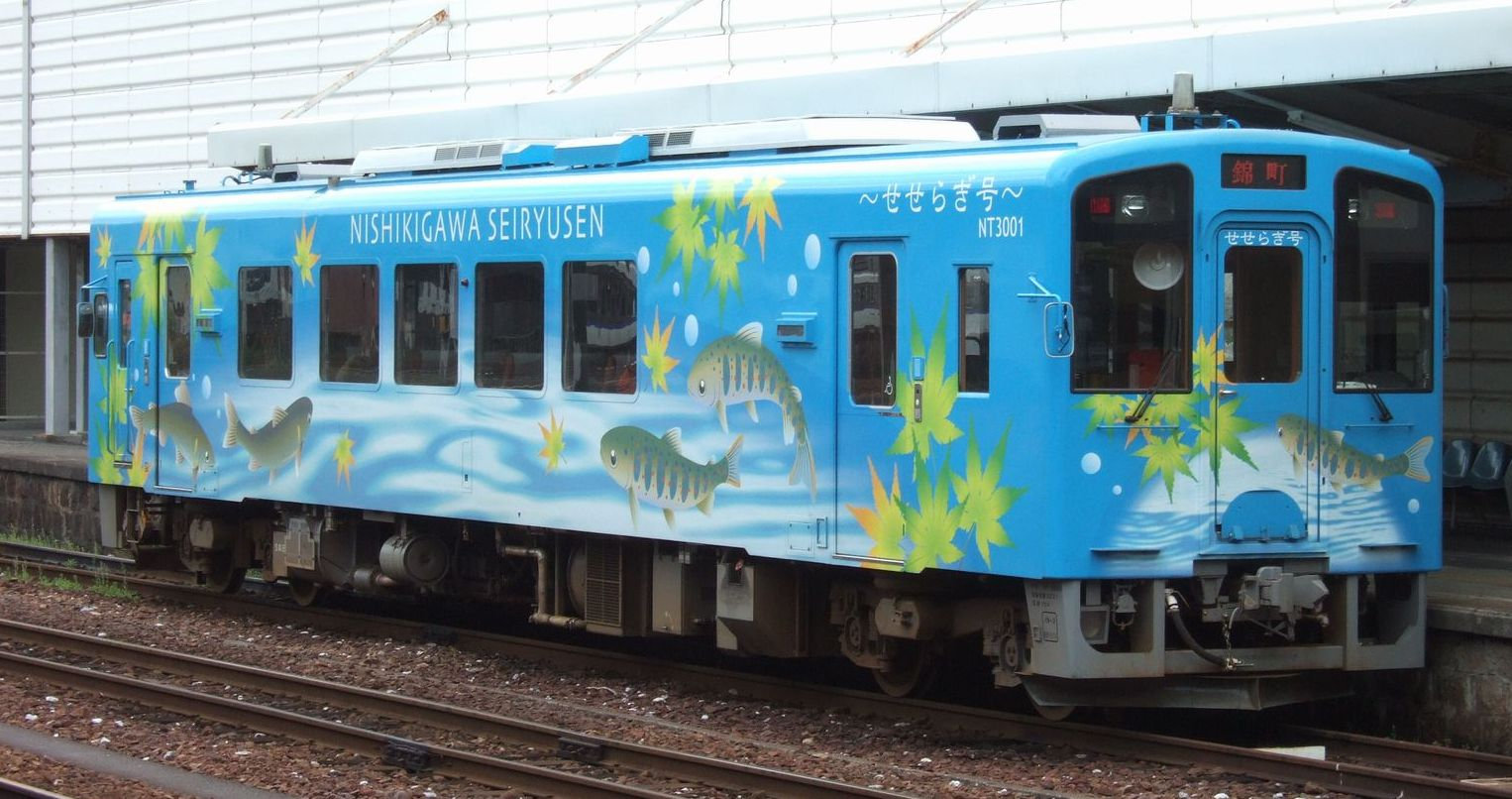 錦川鉄道錦川清流線の所属車両：せせらぎ号(NT-3000型)